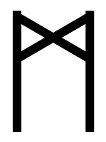 runic letter mannaz